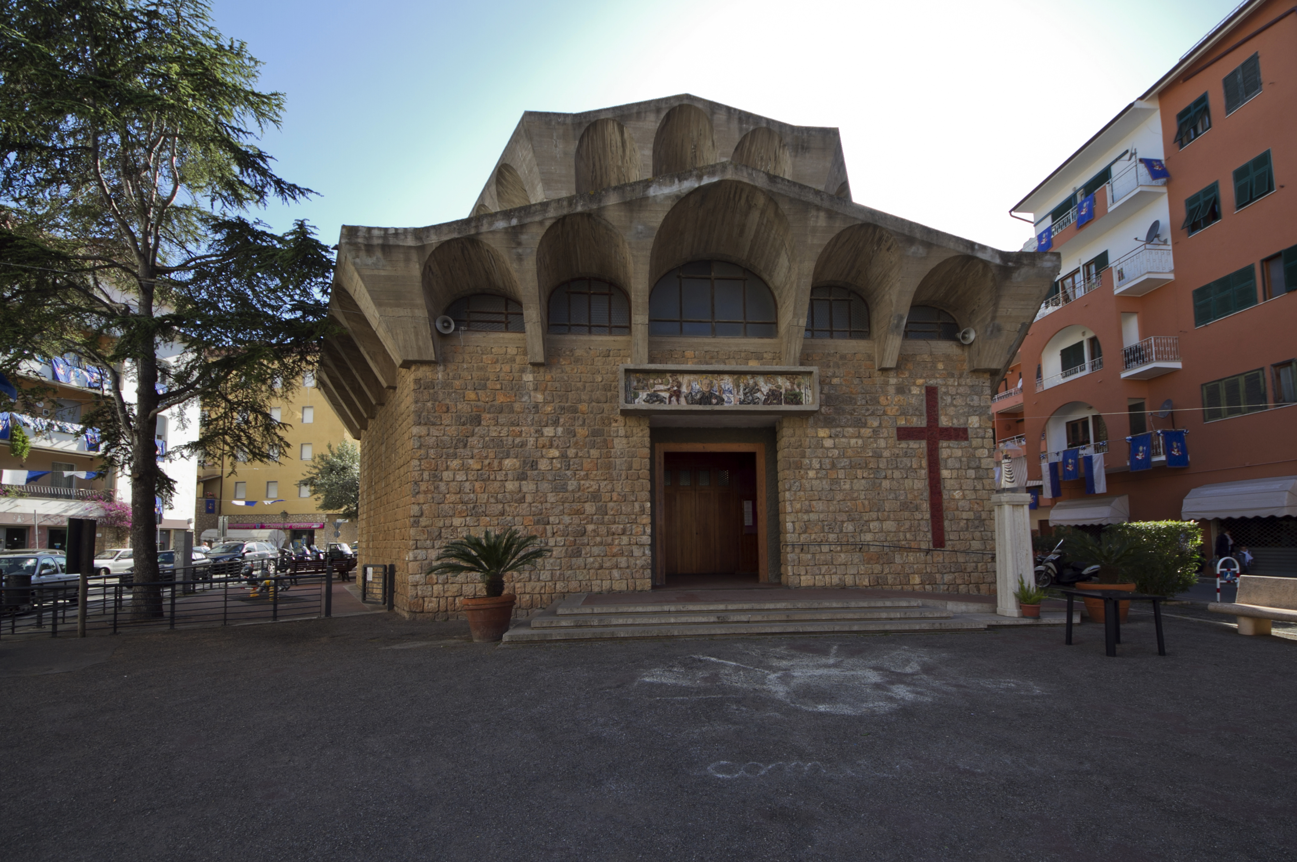 Chiesa di San Paolo della Croce, Porto Ercole, Grosseto, Tuscany, Italy